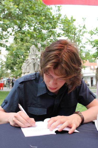 Véghelyi Balázs az Ünnepi Könyvhéten (Budapest, Vörösmarty tér, 2012)